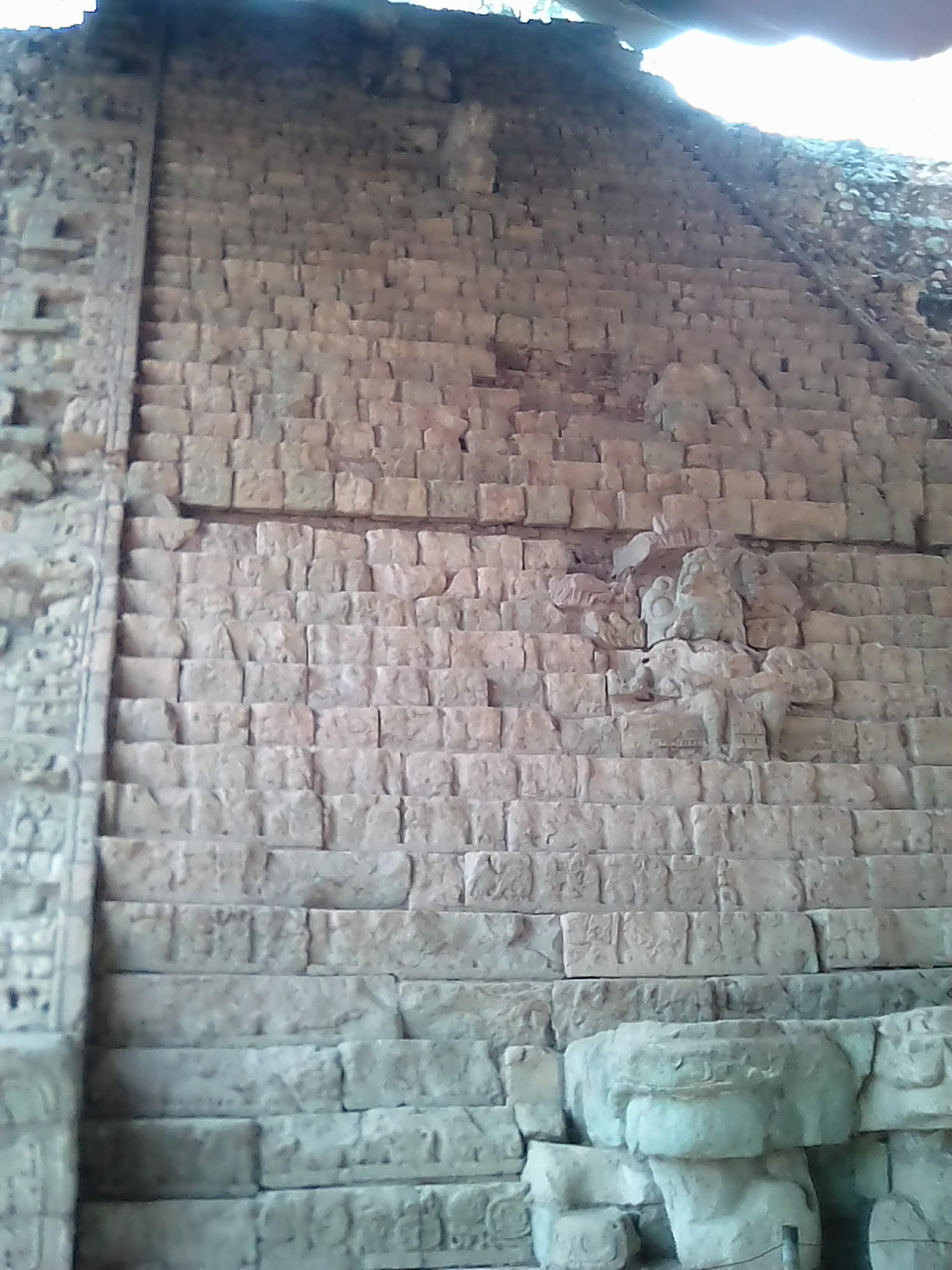 Escalonada